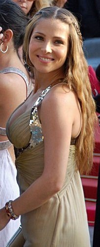 Elsa Pataky au Festival de Cannes.